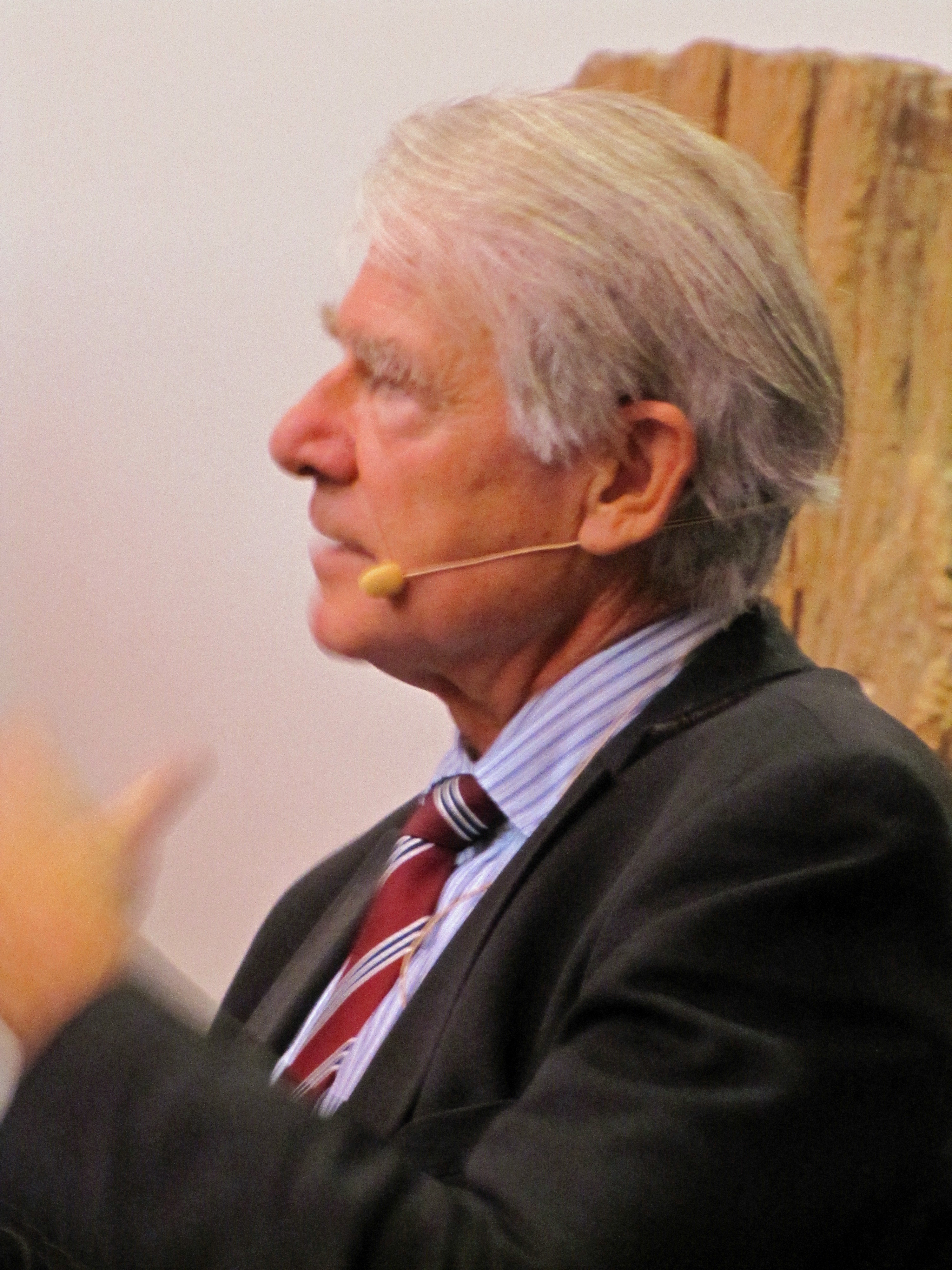 Wolf Singer, beim Podiumsgespräch "Der Hirnforscher Georg Büchner", 2012 im Senckenberg-Museum in Frankfurt am Main.